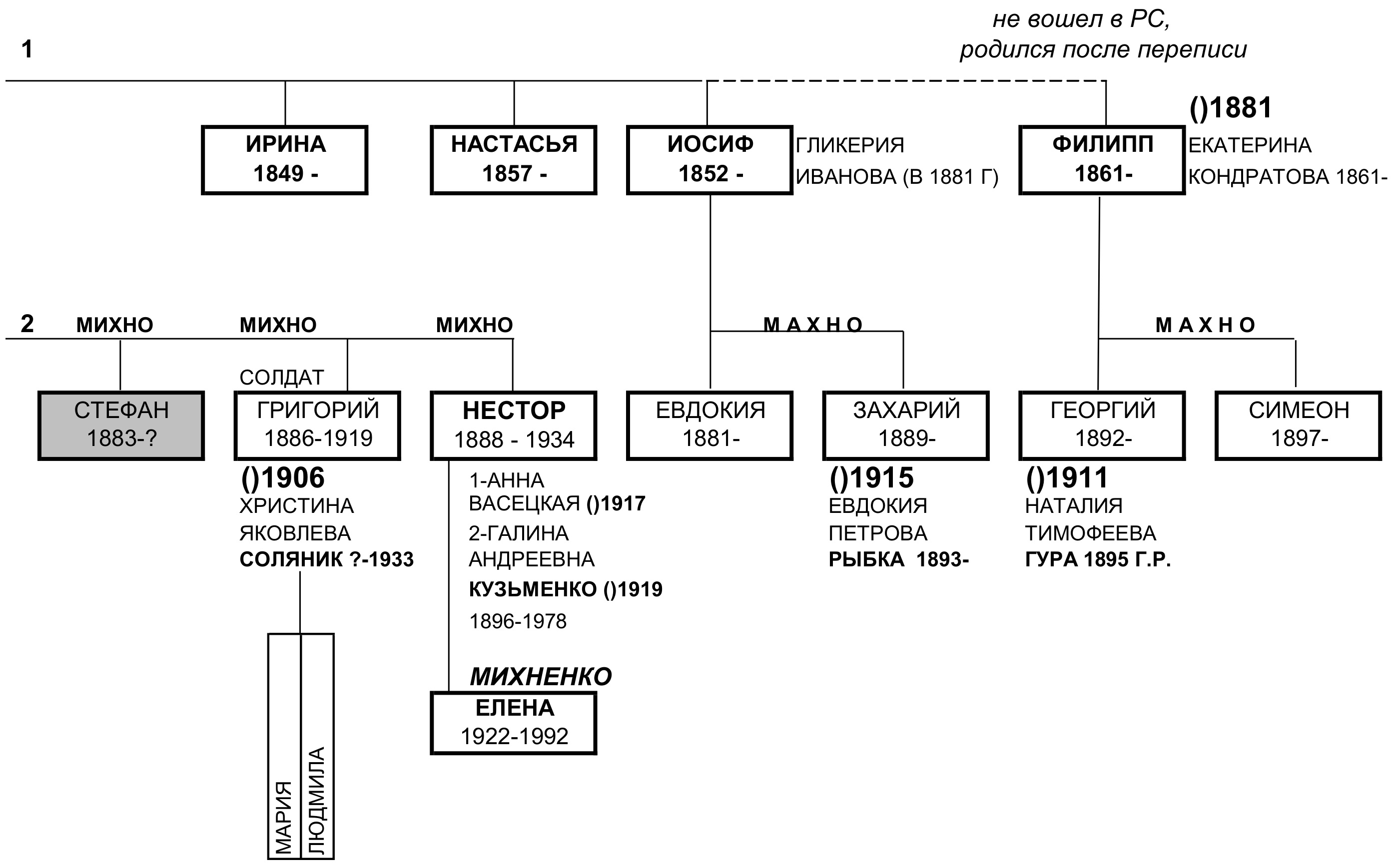 Перший родовід Михненків - потомків Нестора Махна за період з ХVIII по ХХ сторіччя.